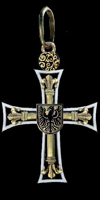 Zelf getekend. Er was geen illustratie voorhanden. Robert Prummel 24 jun 2006 16:28 (CEST)